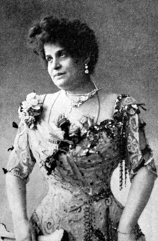 Hegyi Aranka magyar színművész, operett- és dalénekesnő